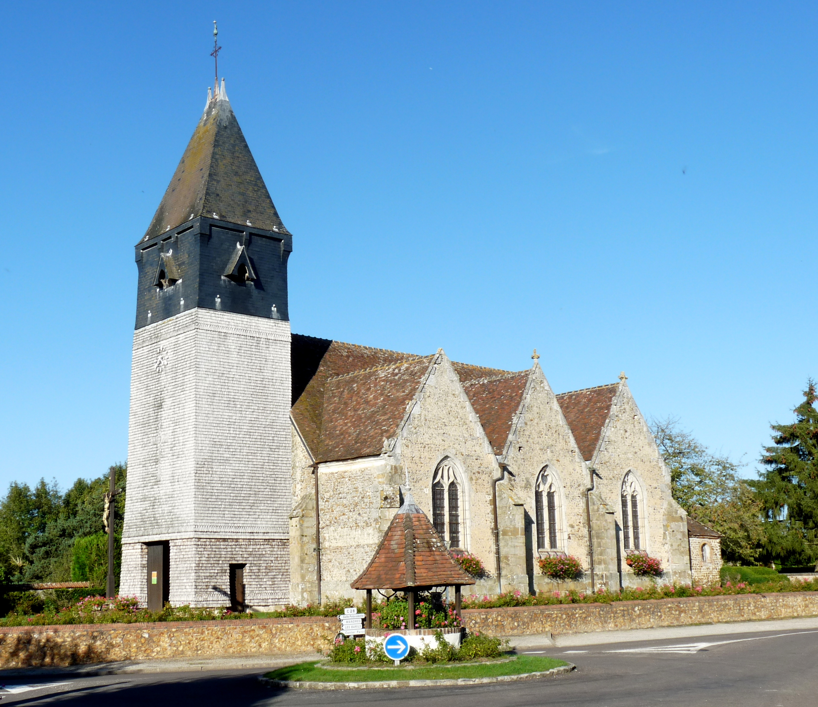 Église Saint-Gervais-et-Saint-Protais de Pullay